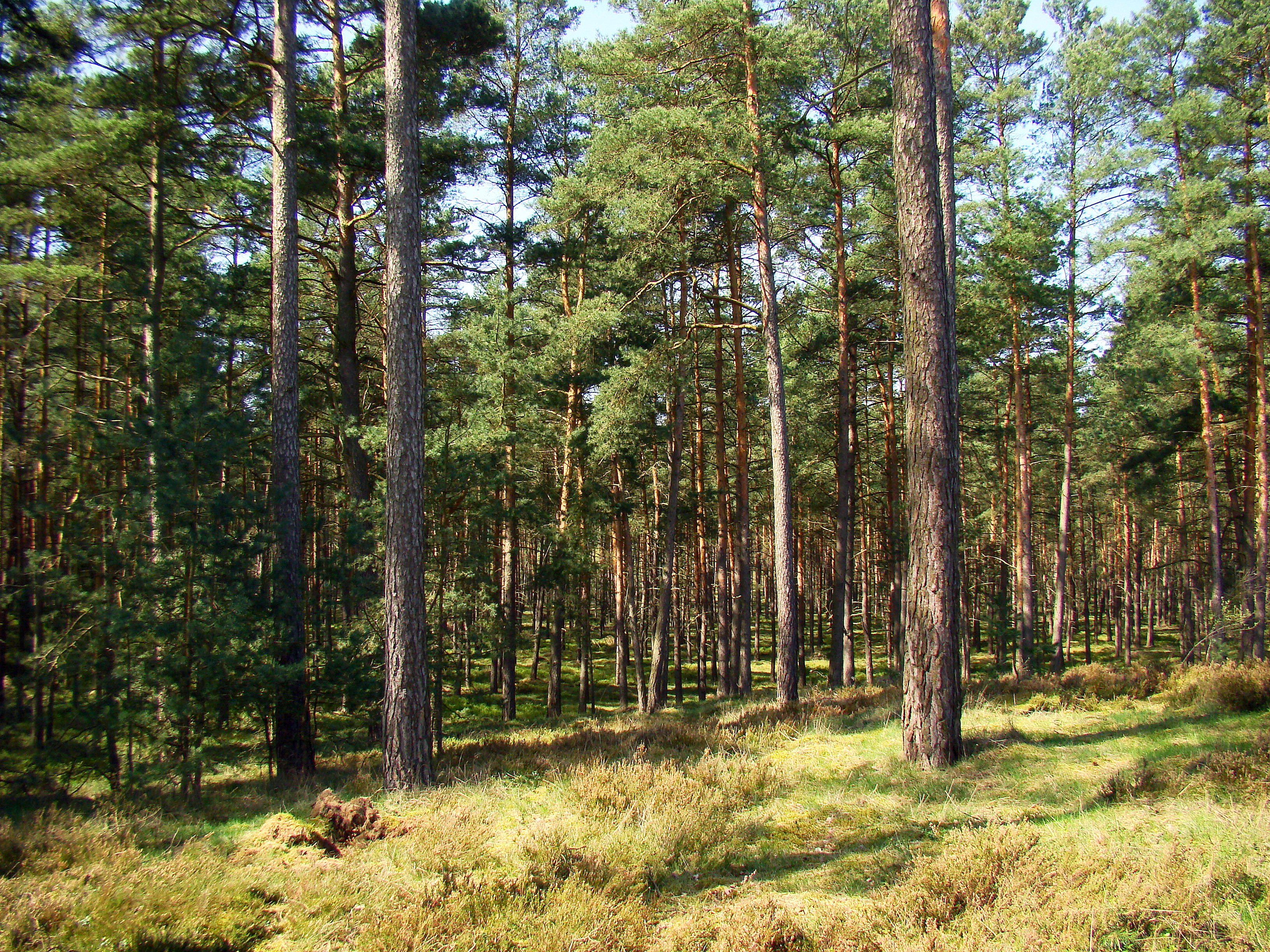 Puszcza Wkrzańska, część środkowa, Powiat policki, Polska